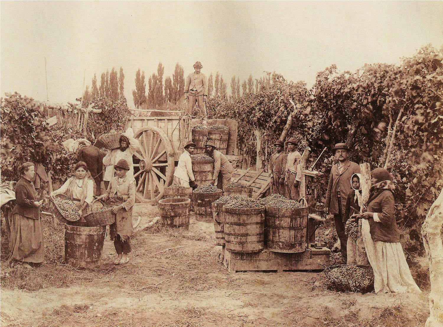 Pesando las uvas luego de la cosecha